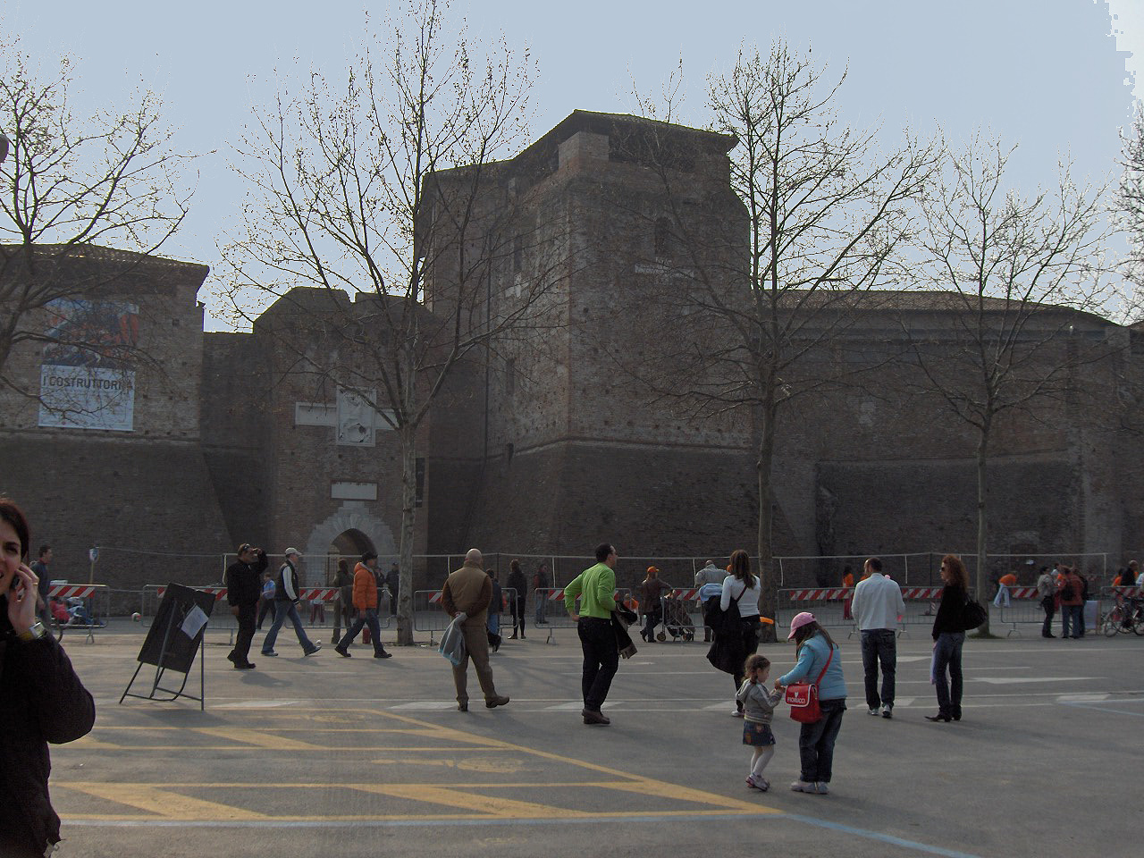 Rimini castle (Castel Sismondo) (1437-1446), Rimini, Italy